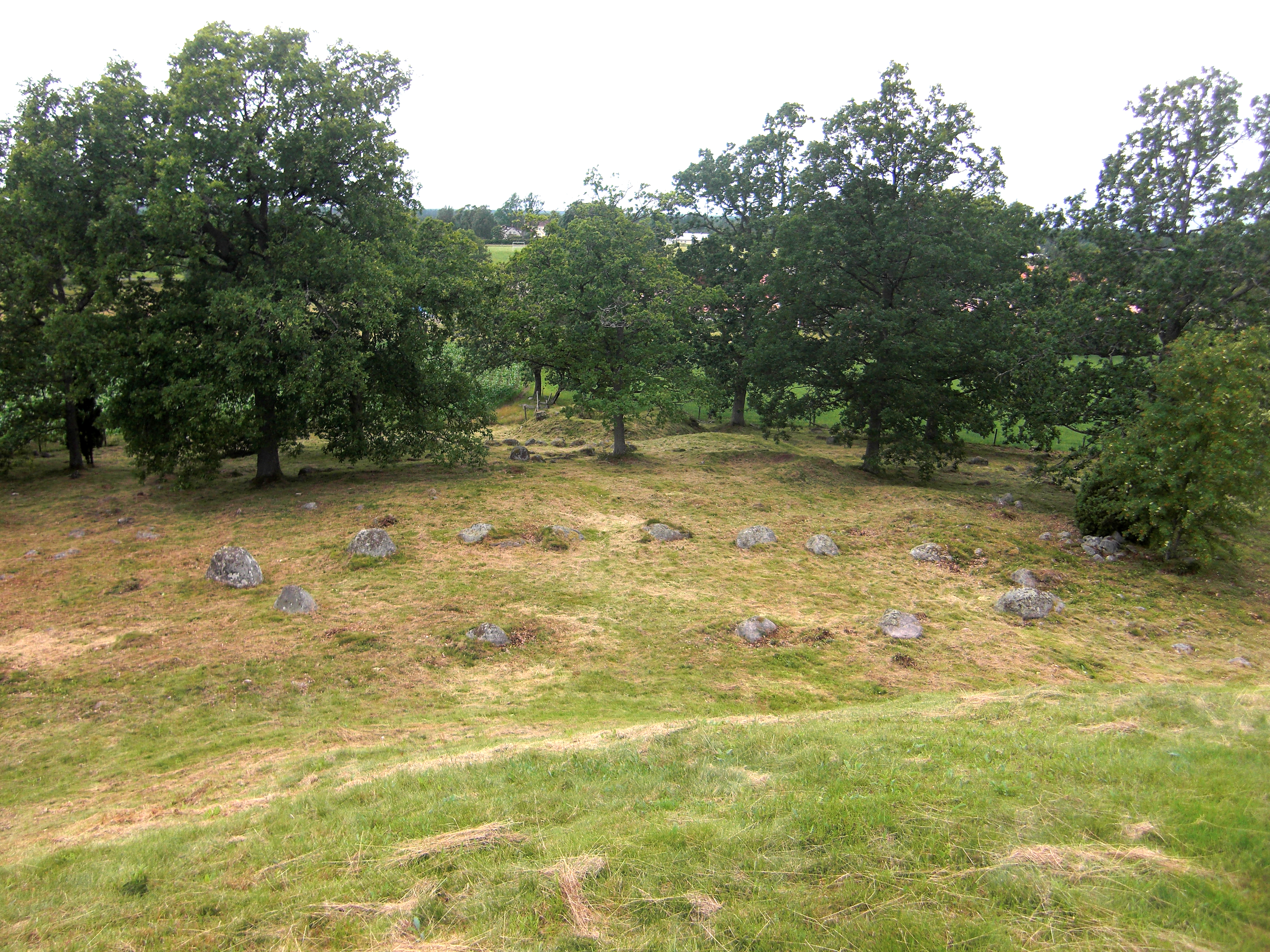 Inglinge hög (Raä-nr Östra Torsås 1:1) strax väster om Ingelstad, Östra Torsås socken, Konga härad, Växjö kommun, Värend, Kronobergs län, Småland. Skeppssättning sedd uppifrån Inglinge hög.